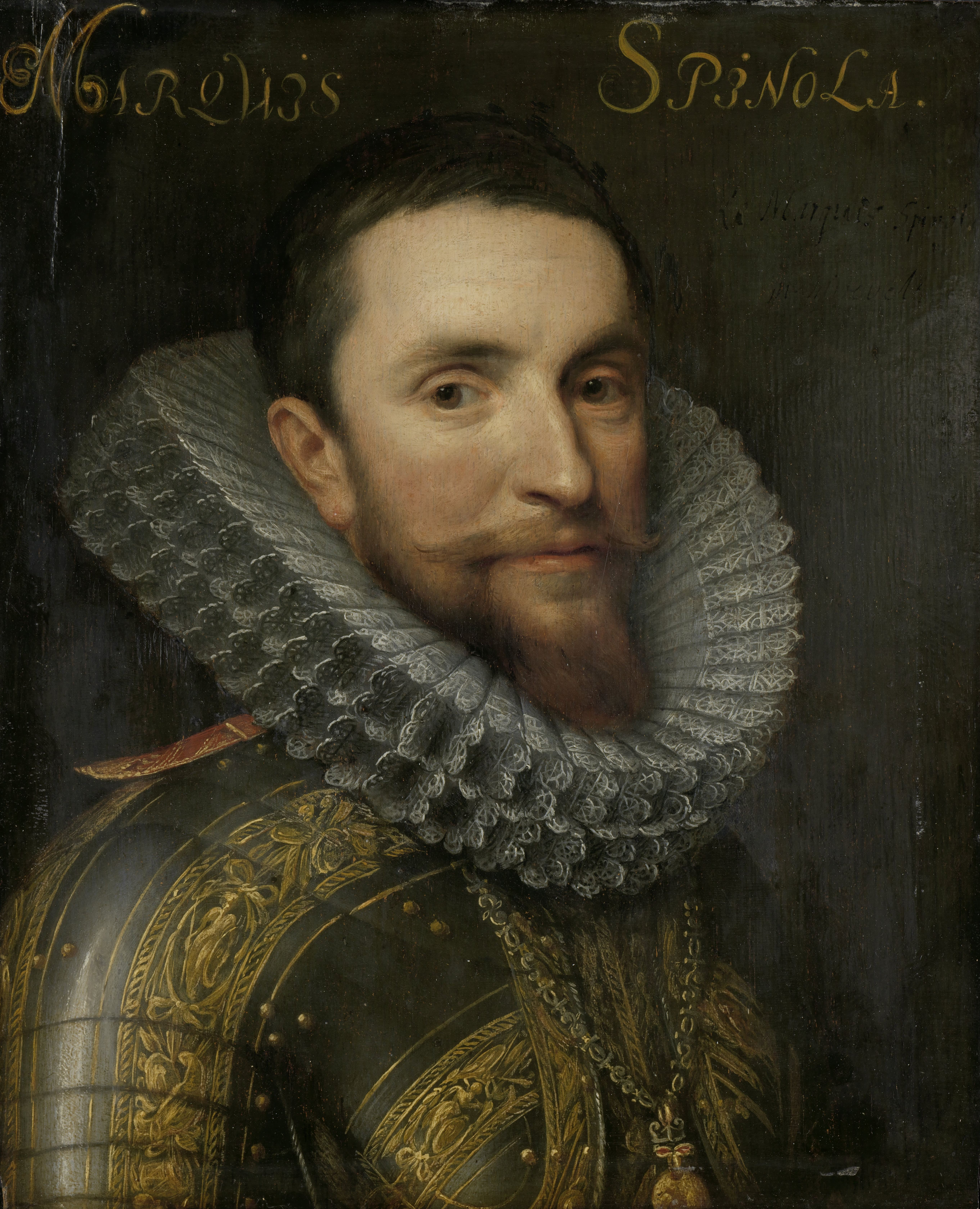 Portret van Ambrogio Spinola. Opperbevelhebber van de Spaanse troepen in de Zuidelijke Nederlanden. Om de hals de keten met het Gulden Vlies. Buste naar rechts, in wapenrusting. Onderdeel van de reeks portretten afkomstig uit het Stadhouderlijk Hof te Leeuwarden. Collection: schilderijen; Leeuwarden serie